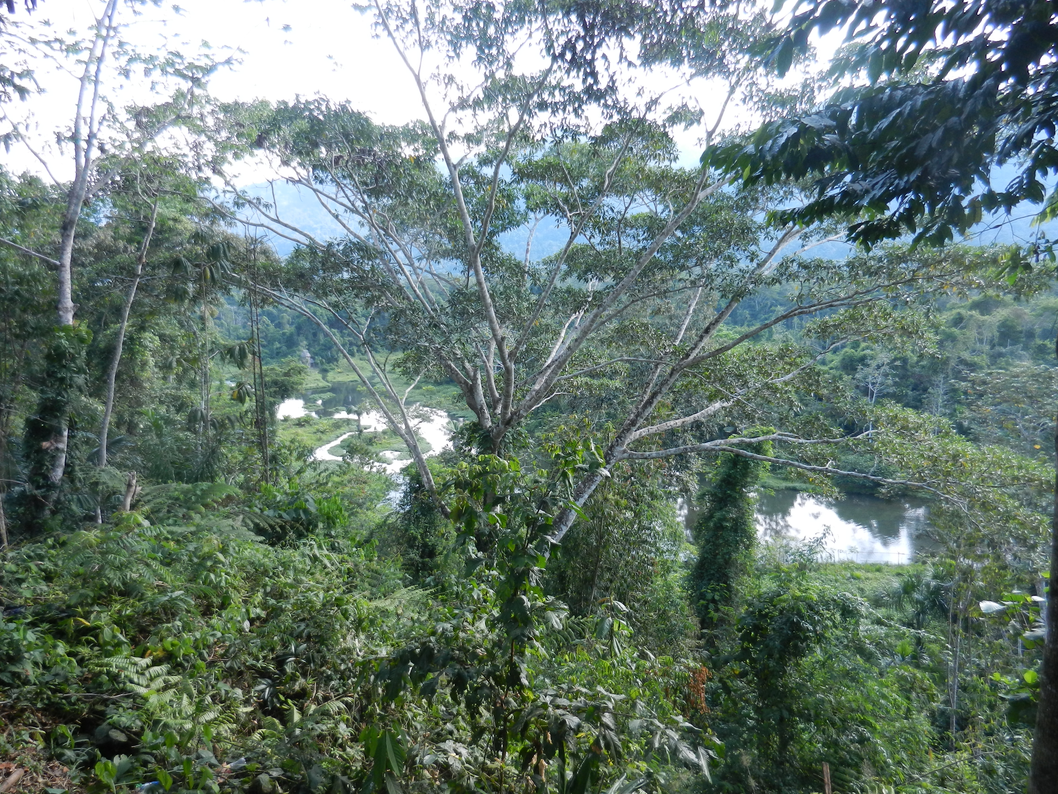 Cocha Machuwasi, Salvación, Manu, Perú